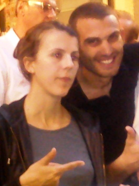 Nicole Ferroni et Stan lauréats du festival du rire 2011 à la Fontaine d'Argent à Aix-en-Provence